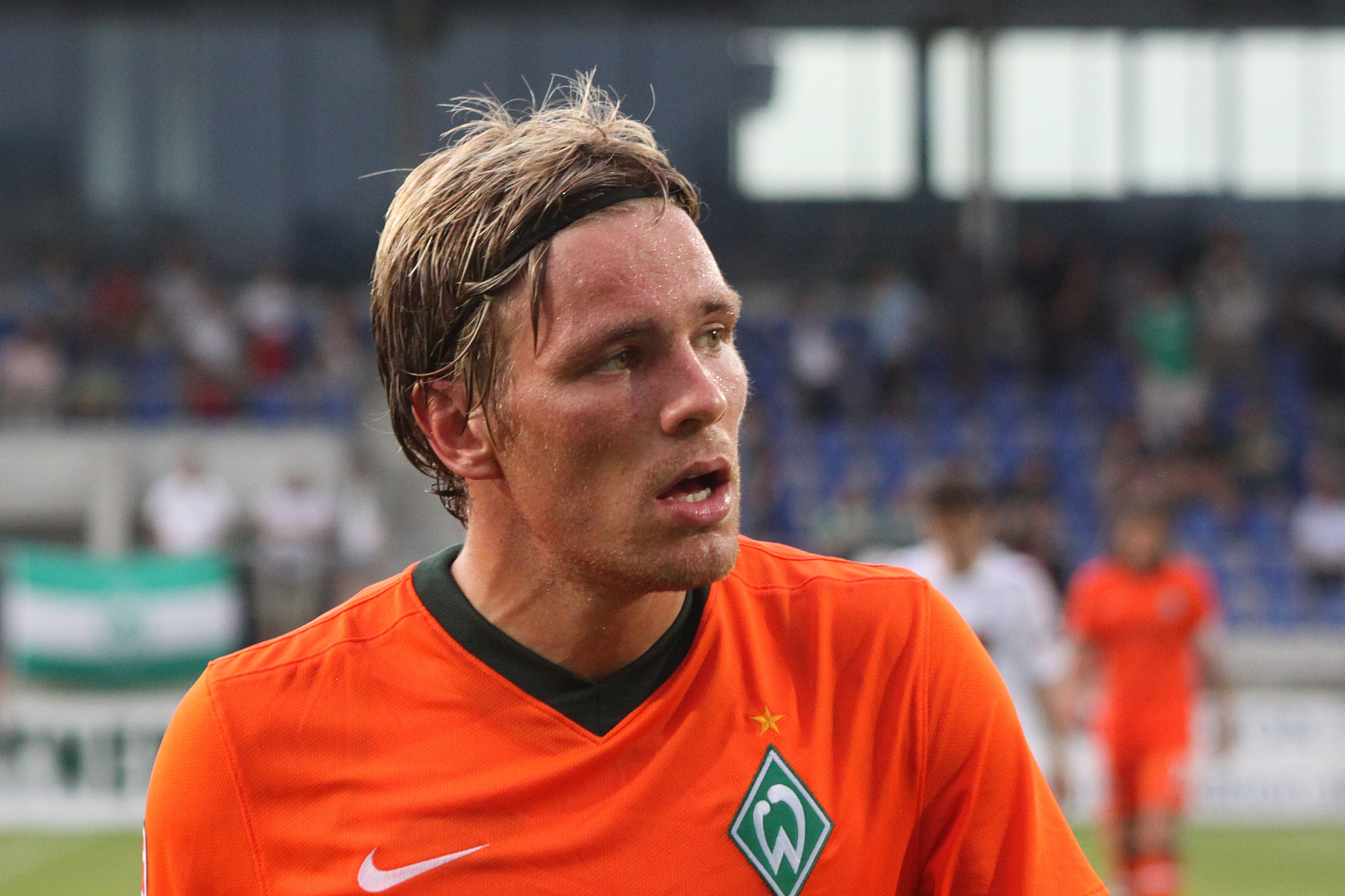 Clemens Fritz - SV Werder Bremen (2)